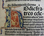 Inkunabel